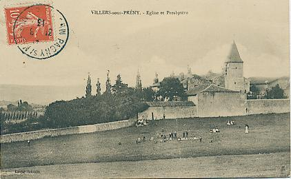 Villers-sous-Prény carte postale ancienne